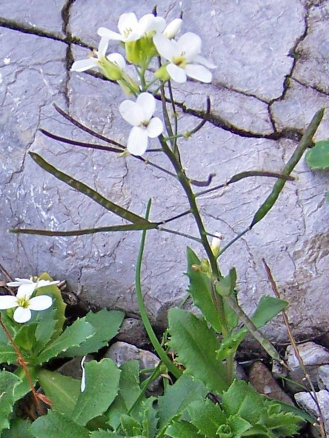 Arabis alpina (Tatra Mountains, Czerwone Wierchy, Kobylarzowy Żleb